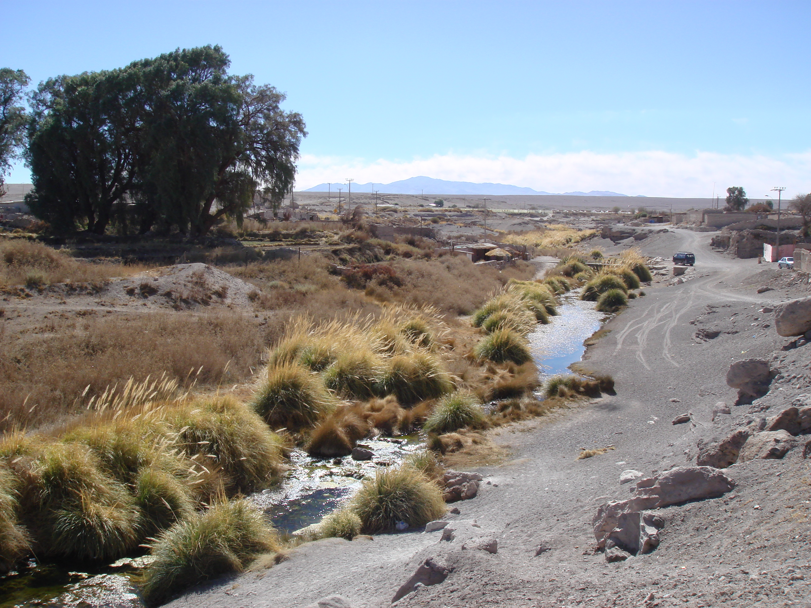 Chiu Chiu